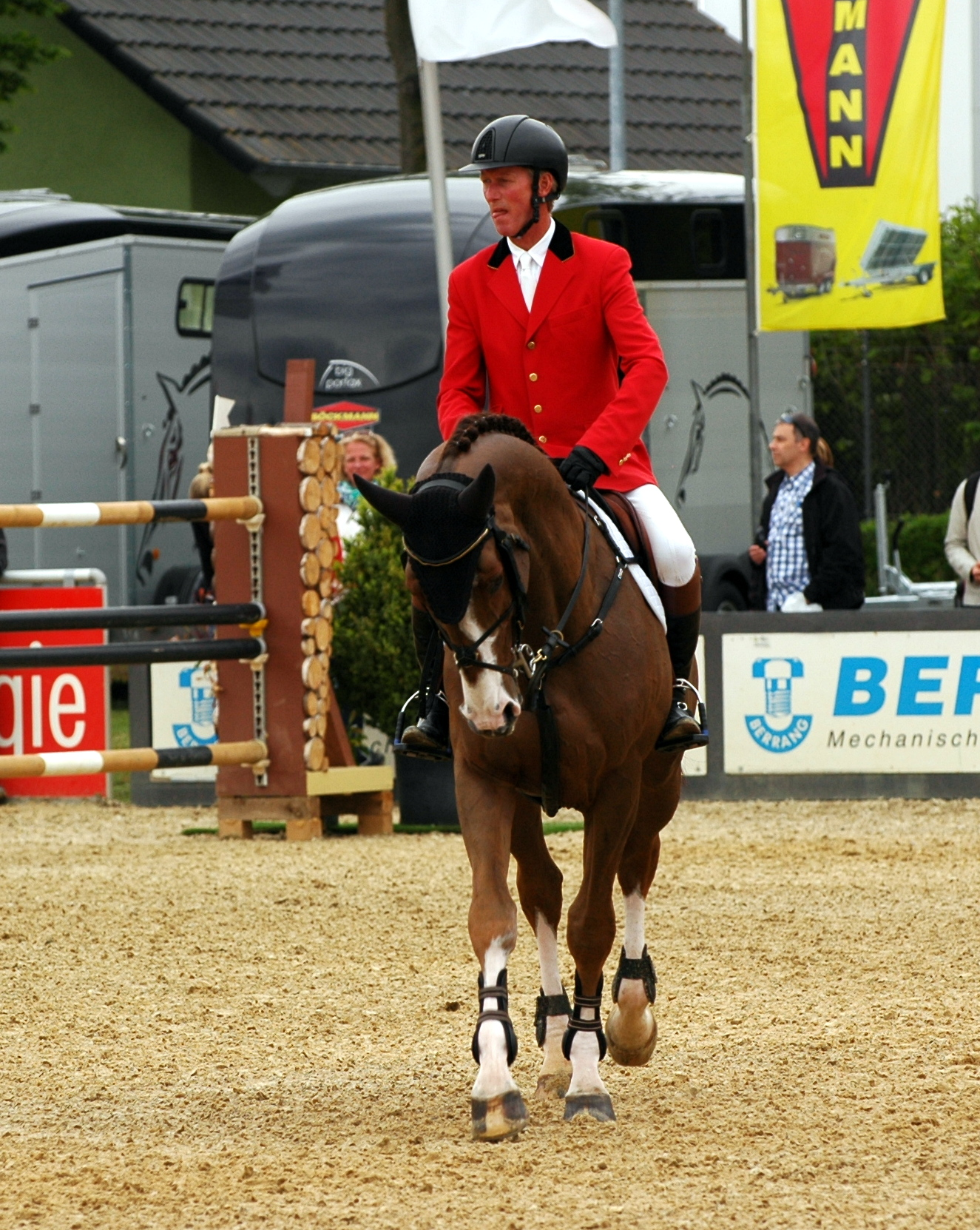 Maimarkt Mannheim 2015: Jos Lansink mit Aganix du Seigneur